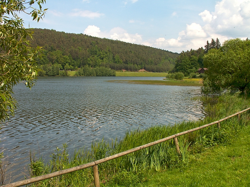 Marbach-Stausee (Germany, Hessen, Odenwald)